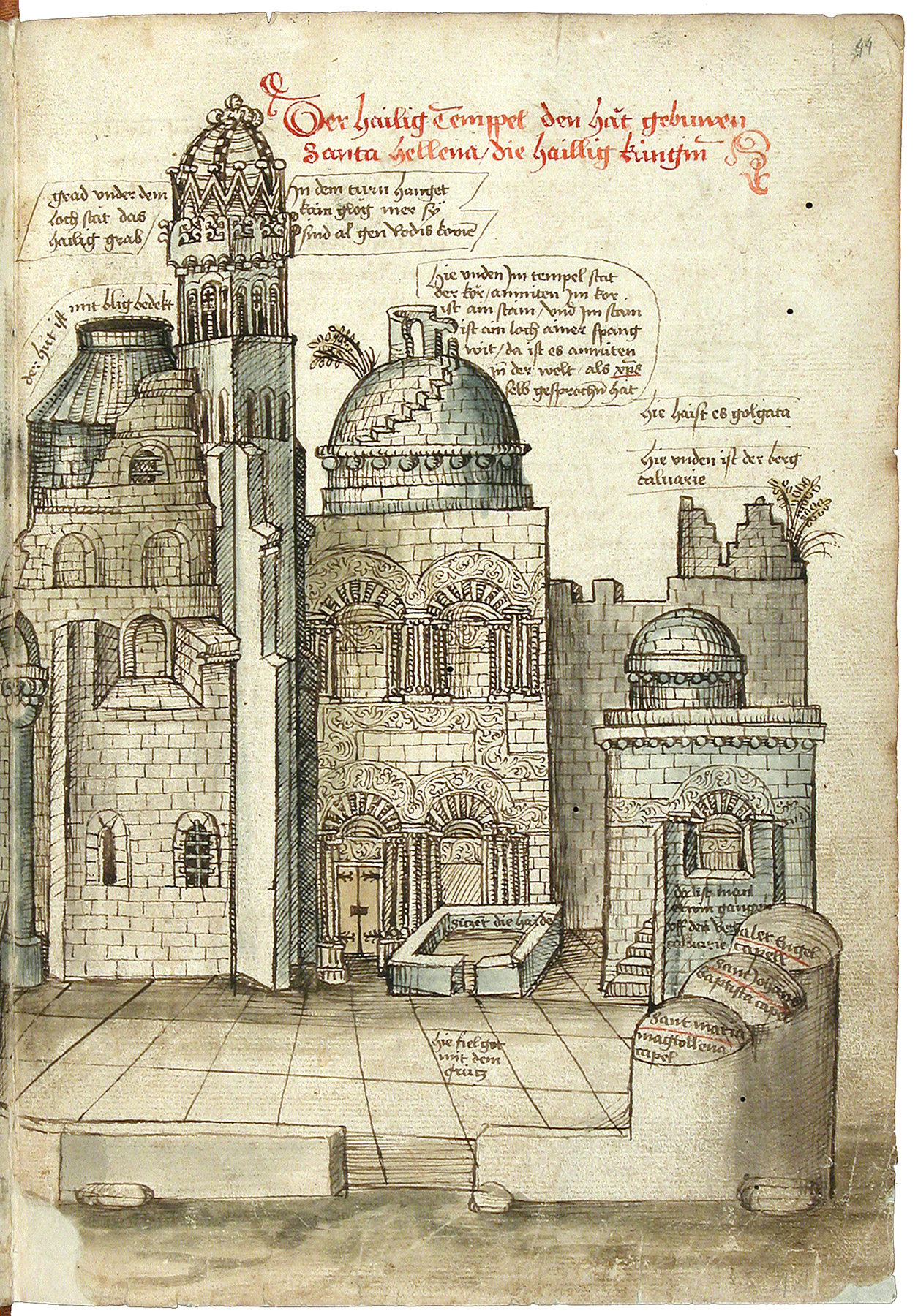 Schilderung einer Pilgerreise von Konstanz nach Jerusalem durch Konrad von Grünenberg, um 1487 Konrad von Grünenberg: Beschreibung der Reise von Konstanz nach Jerusalem - Cod. St. Peter, pap. 32. Handschrift, Bodenseegebiet (Konstanz?), um 1487. II + 53 Blätter, 32x21, mit 31 kolorierten Zeichnungen der Reiseroute von Venedig bis Palästina. Text in alemannischer Mundart.